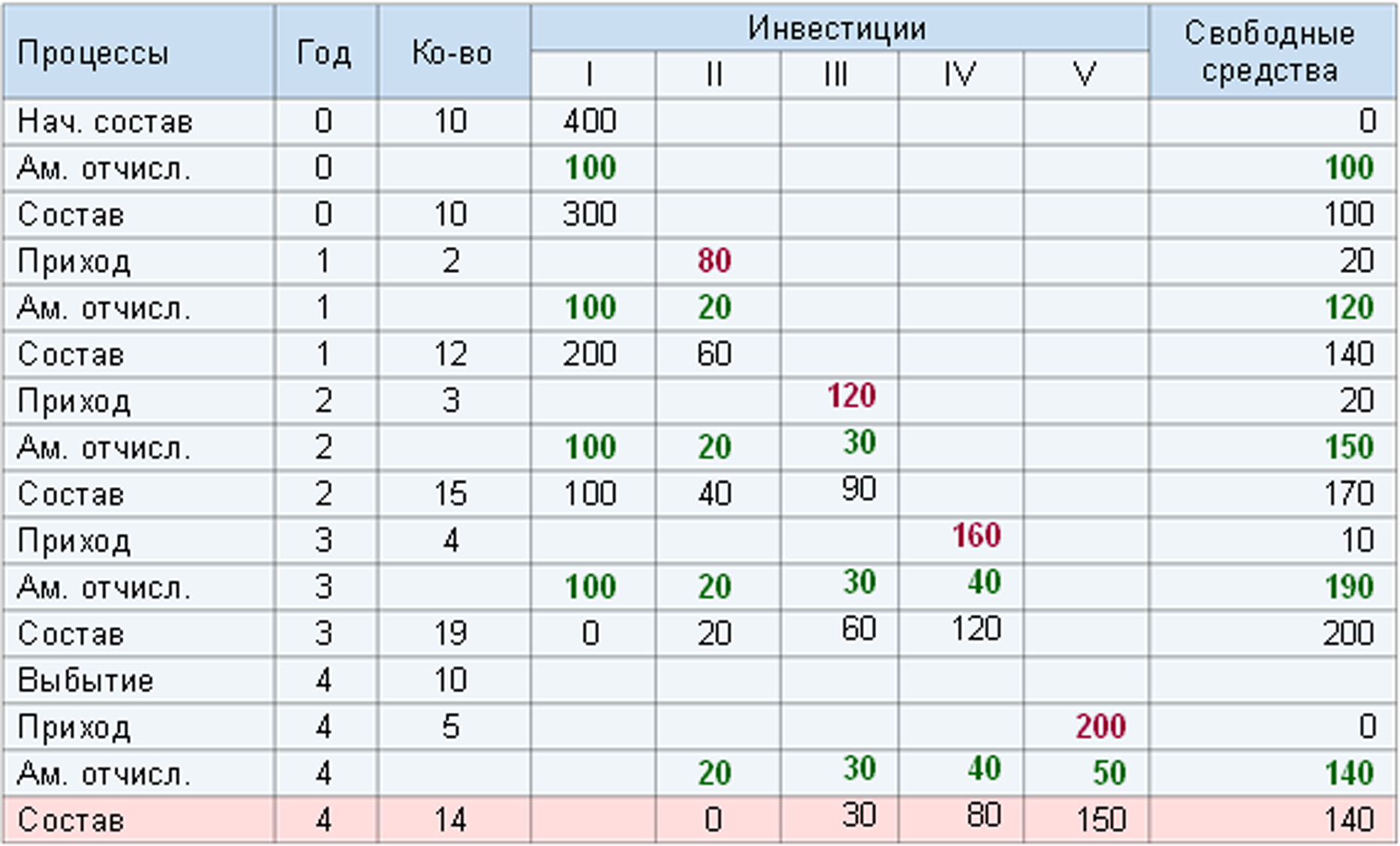 Ступенчатая форма таблицы